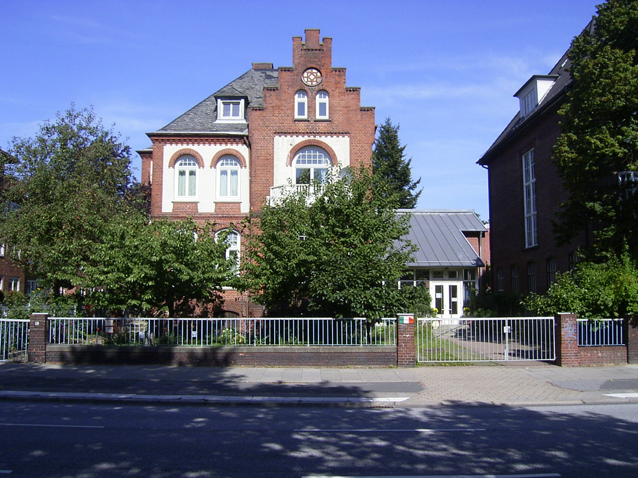 Missione Cattolica Italiana (Italienische Katholische Mission) in Borgfelde (Bürgerweide)